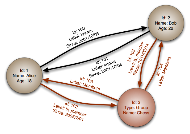 Abbildung eines Property Graphen bei Graphdatenbanken